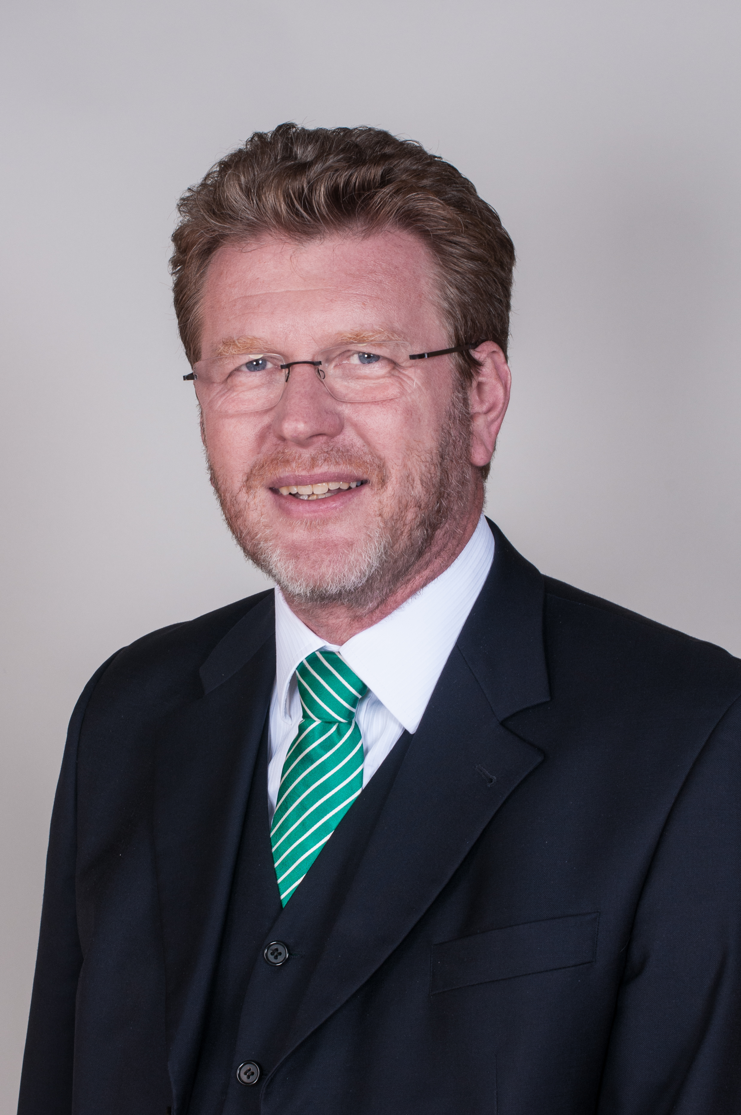 Landtagsprojekt Bayern The making of this work was supported by Wikimedia Austria. For other files made with the support of Wikimedia Austria, please see the category Supported by Wikimedia Österreich. Wikipedia im Landtag – Bayern 17. bis 19. Juli 2012 in München Dieses Foto wurde im Rahmen des Projektes „Wikipedia im Landtag“ erstellt.